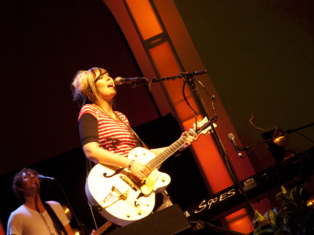 Vicky Beeching